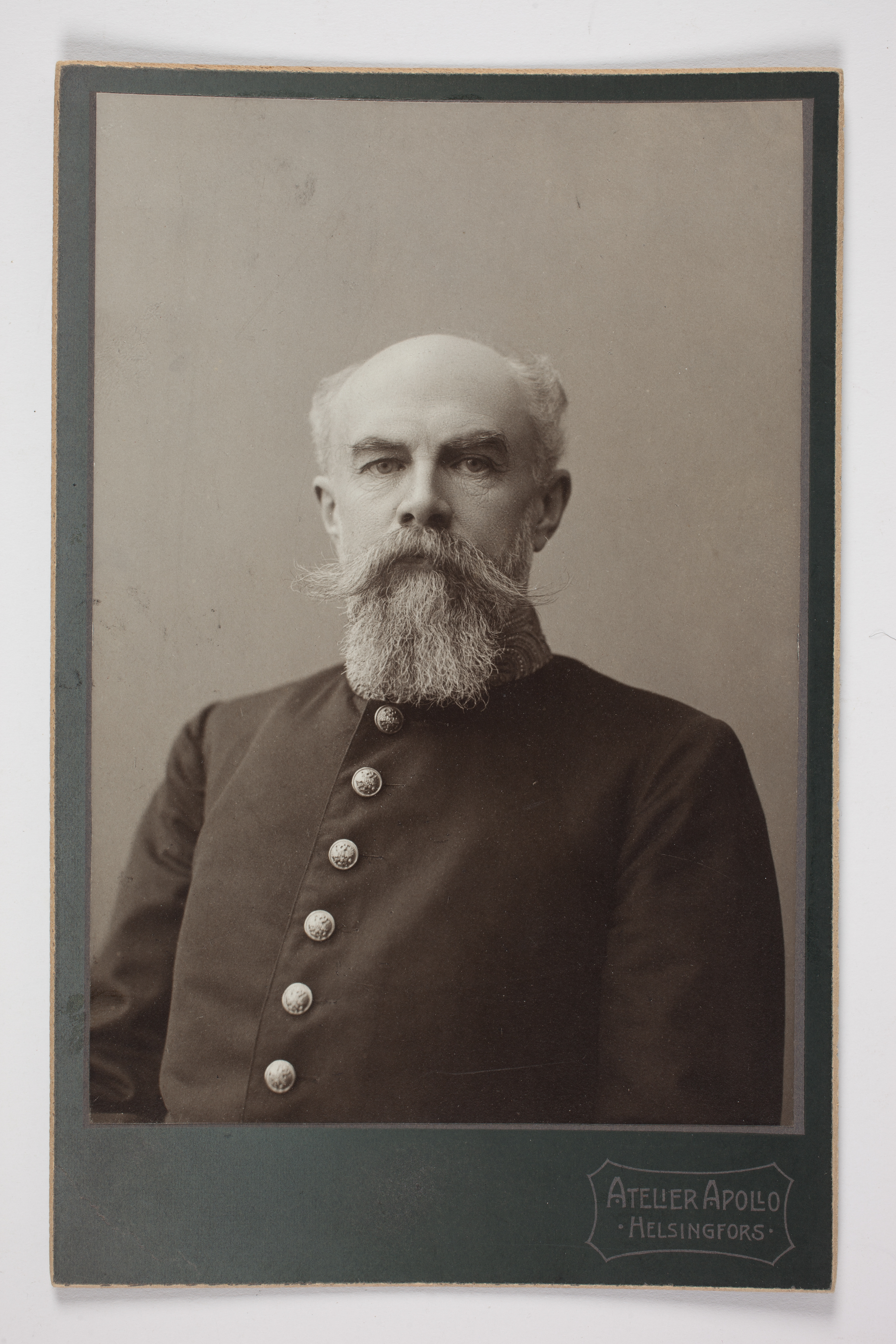 Viktor Magnus von Born i landmarskalksuniform 1906.